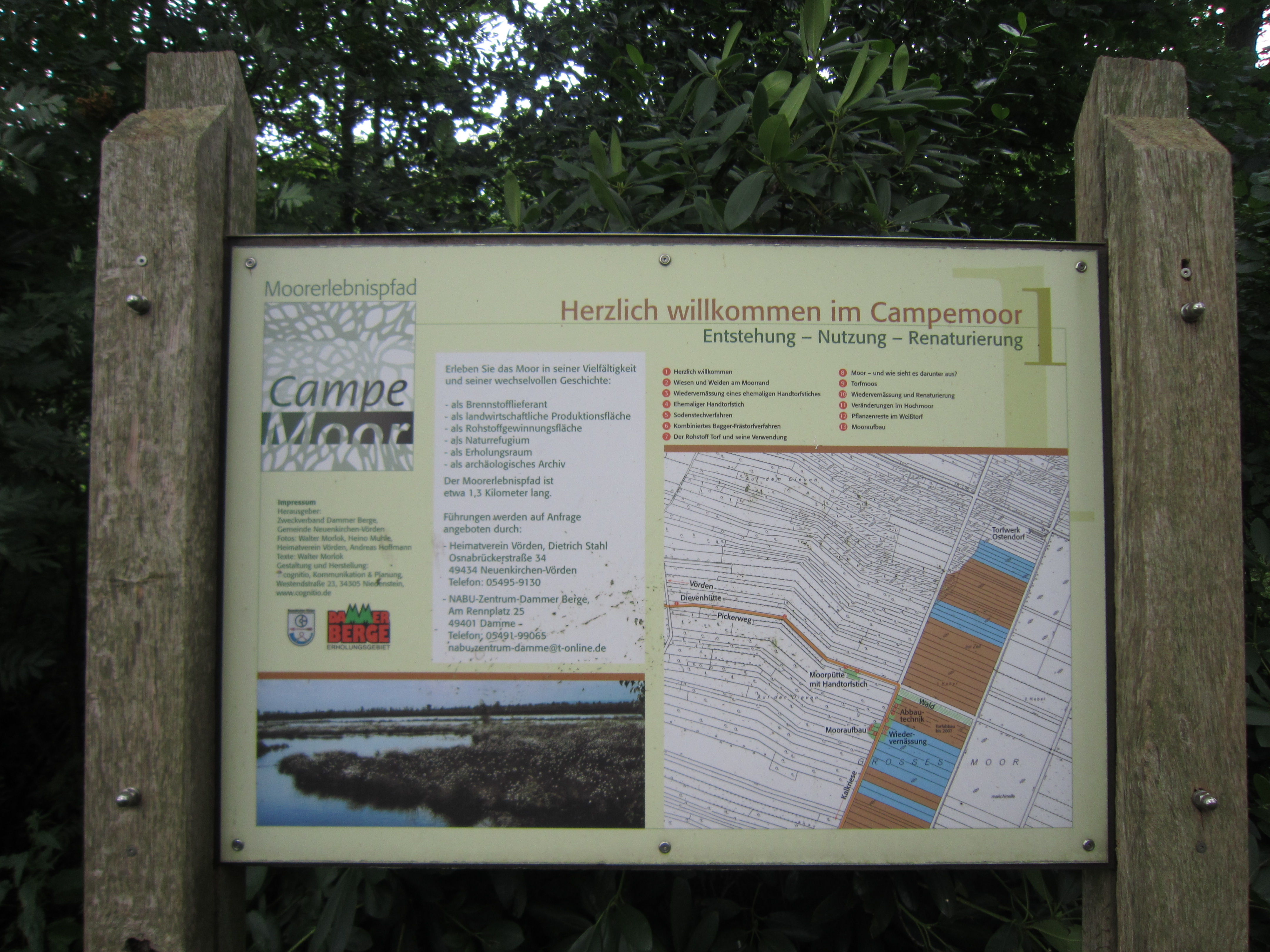 Informationstafel neben dem Moorlehrpfad am Rande des Großen Moores bei Campemoor (Gemeinde Neuenkirchen-Vörden, Landkreis Vechta in Niedersachsen)